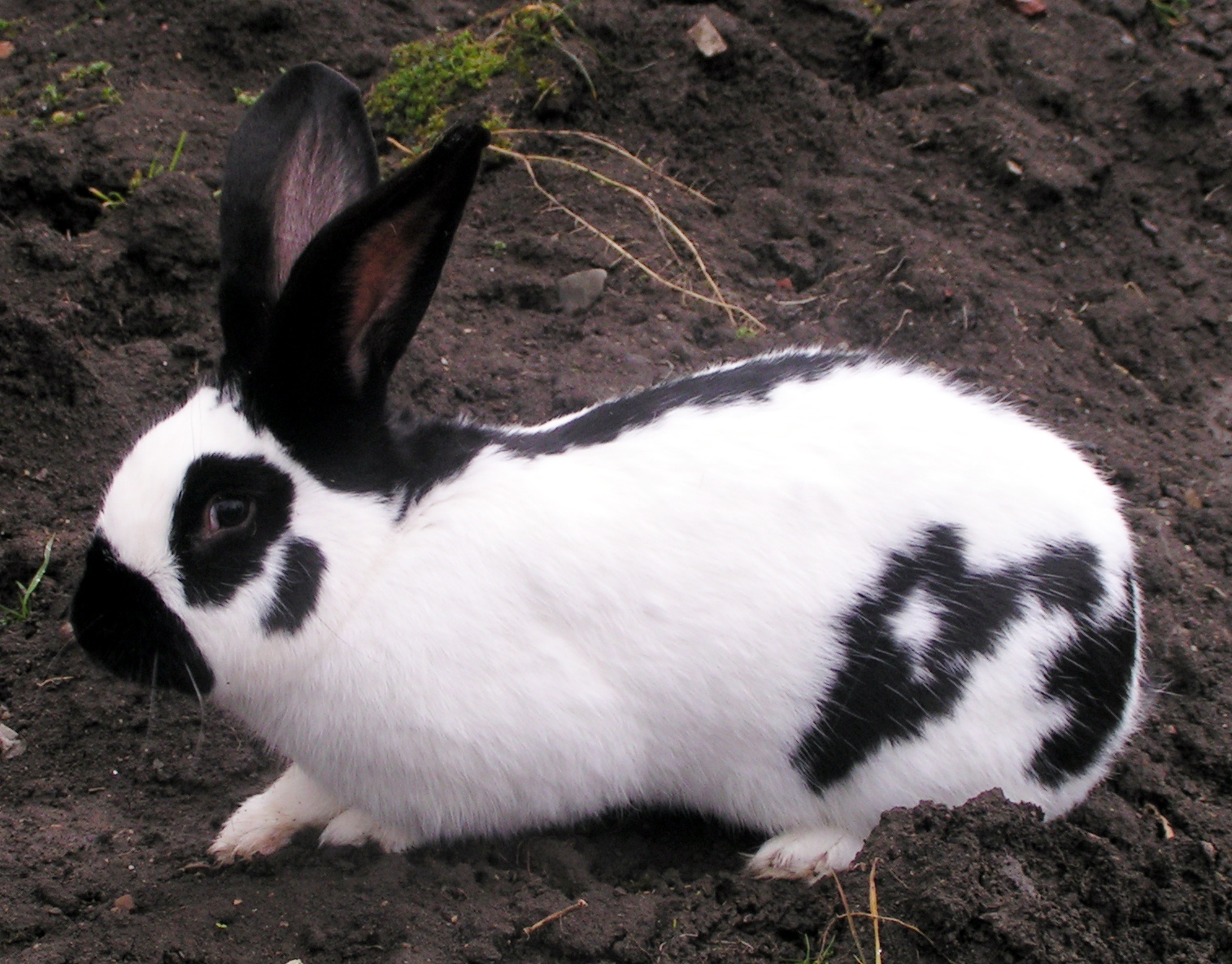 Nemecký obrovitý strakoš